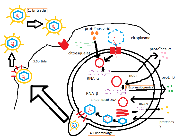 cicle esquemàtic d'un virus herpesvirus